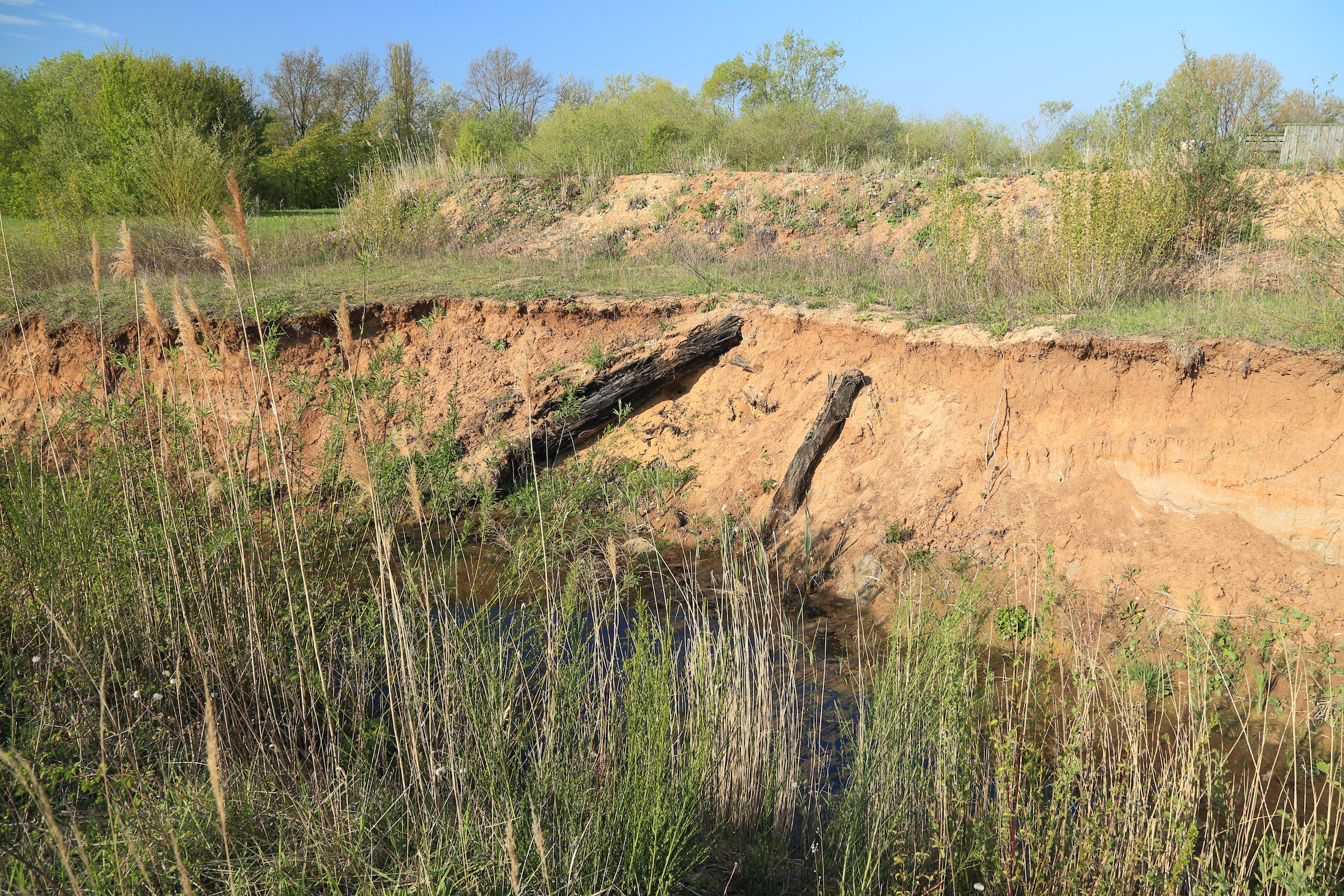 Mainauen WSW von Ziegelanger Geotop-Nummer: 674A016 Bayerns schönstes Geotop Nr.: 85